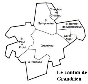 Le canton de Grandrieu Image personnelle